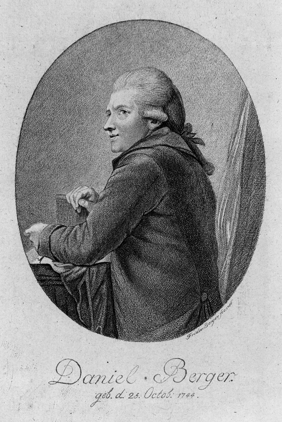 Portrait Daniel Berger, 1786, aus: Carl Ludwig Oesfeld, August Wilhelm Crayen: Anzeige sämmtlicher Werke von Herrn Daniel Berger, Rector und Lehrer der Kupferstecherkunst bey der Königlichen Preussischen Akademie der Künste und mechanischen Wissenschaften zu Berlin. Mit Genehmigung des Künstlers herausgegeben und nach der Zeitfolge geordnet; nebst dessen Bildniss, Leipzig, Rostische Kunsthandlung, 1792